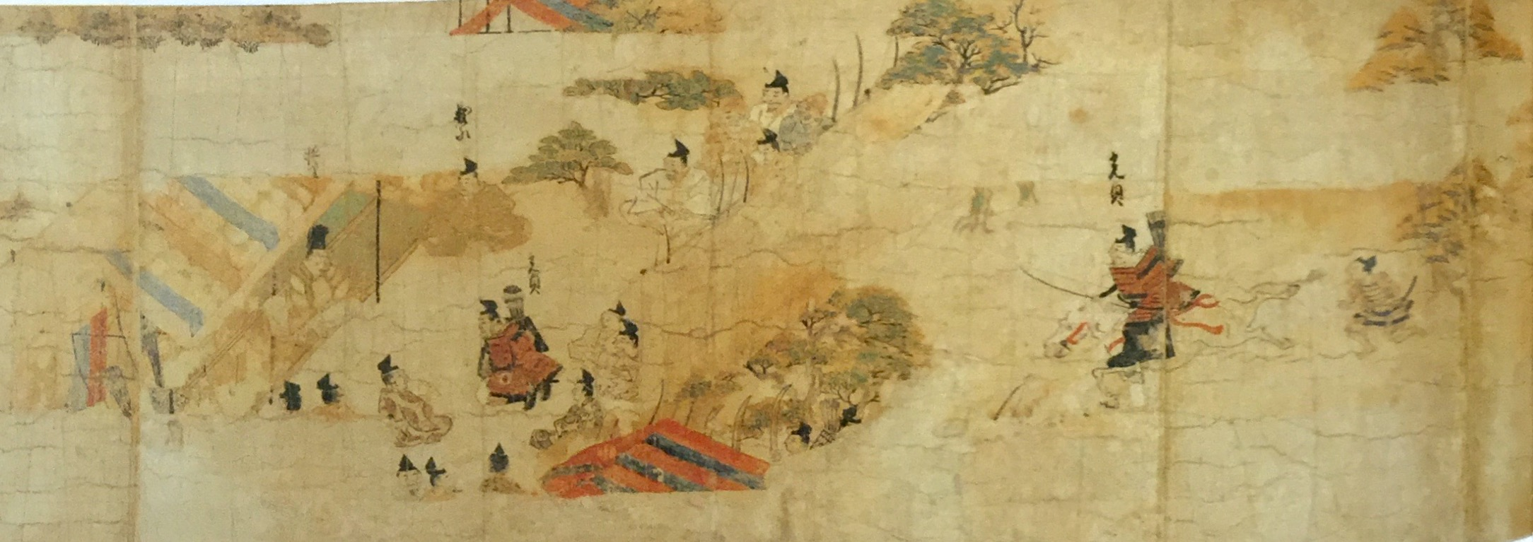 前九年合戰繪卷，現存於東京國立博物館。